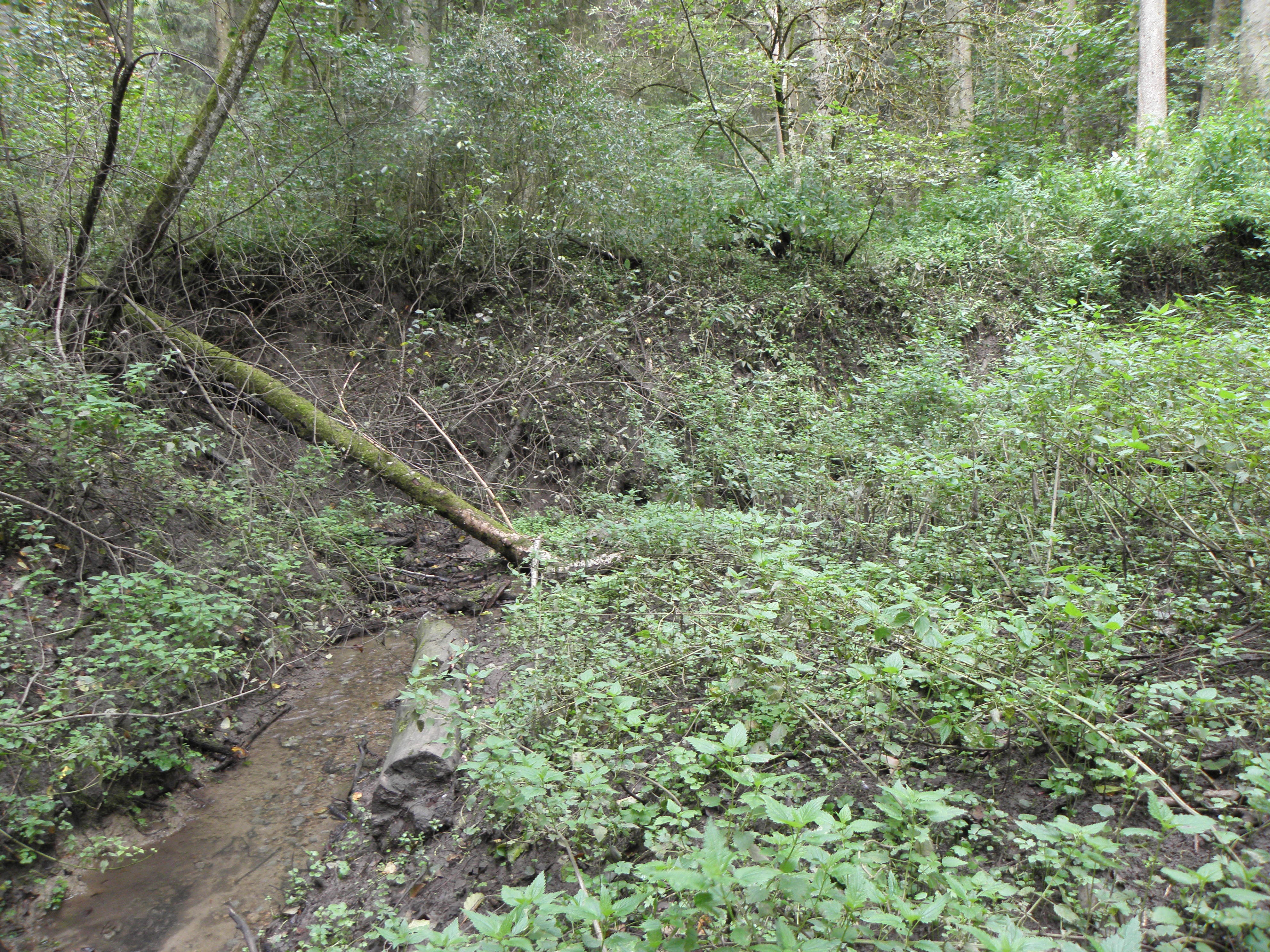 Der Annenbach verschwindet in dieser Doline.